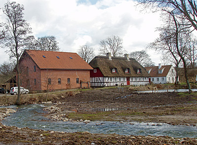 Fulden Mølle ved Giber Å, Beder Sogn, Ning Herred, Århus Amt. Denmark